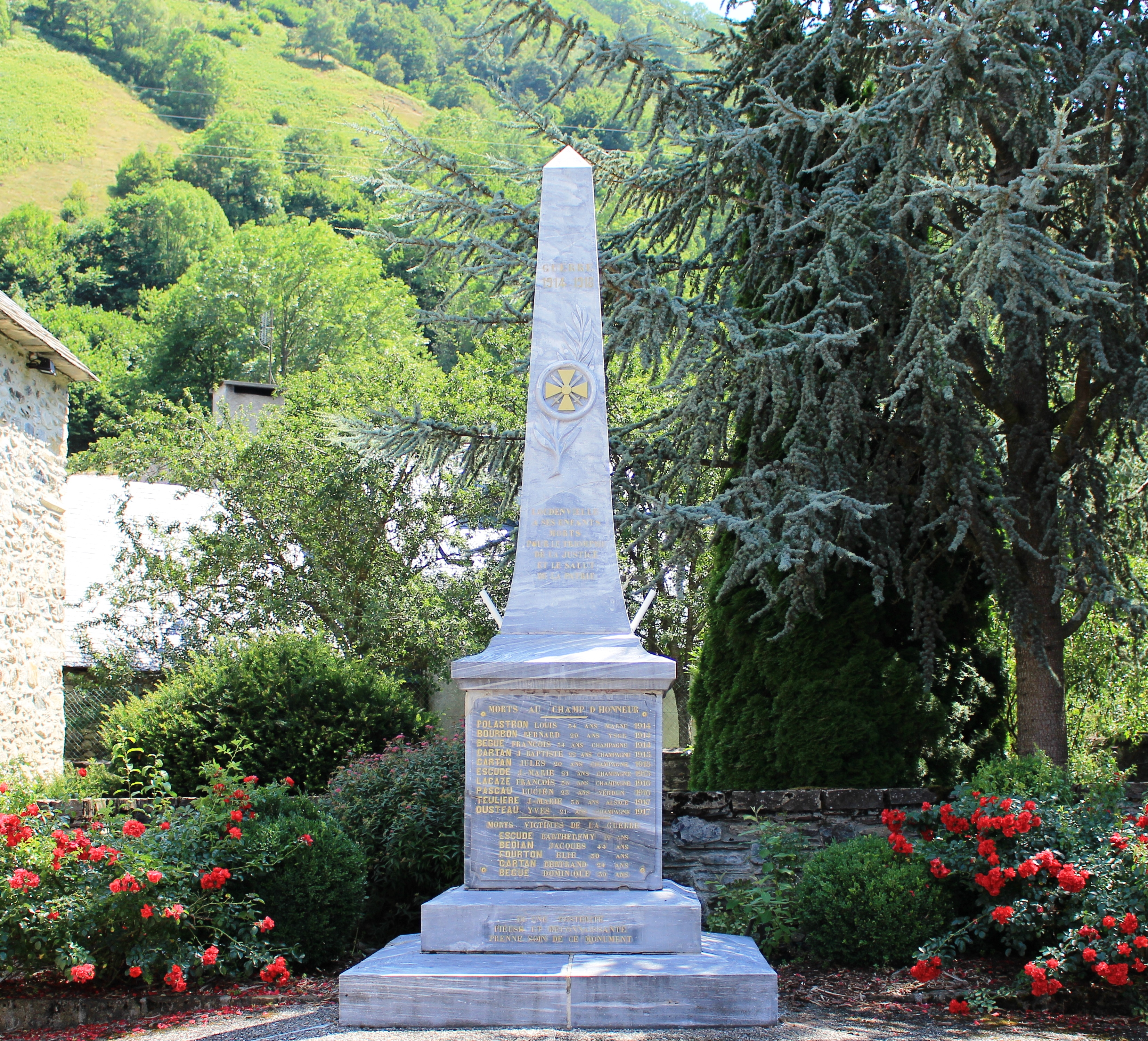 Monument aux morts de Loudenvielle (Hautes-Pyrénées)